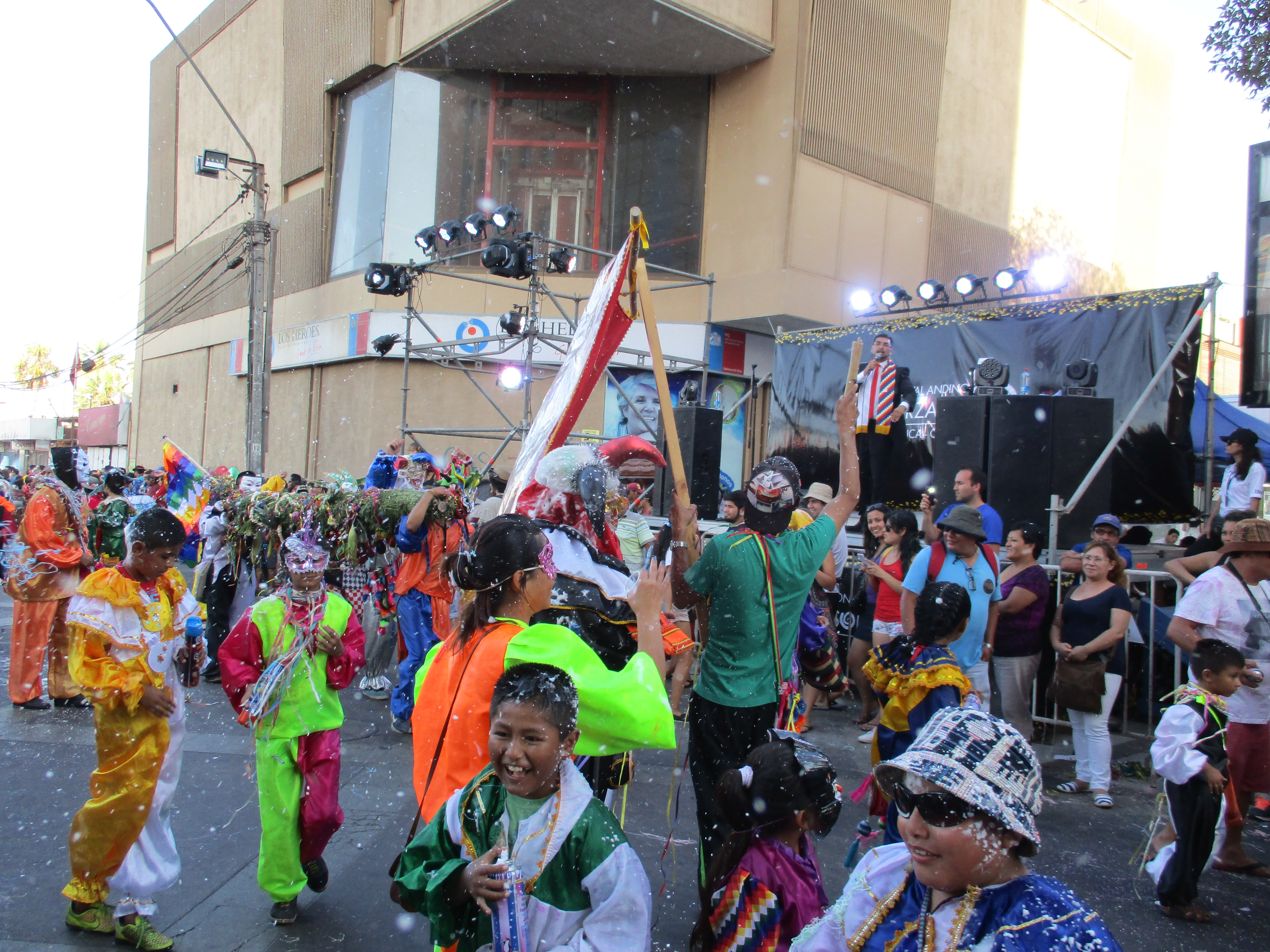 Tarqueada Villarroel B (Carnaval con la Fuerza del Arica 2016)